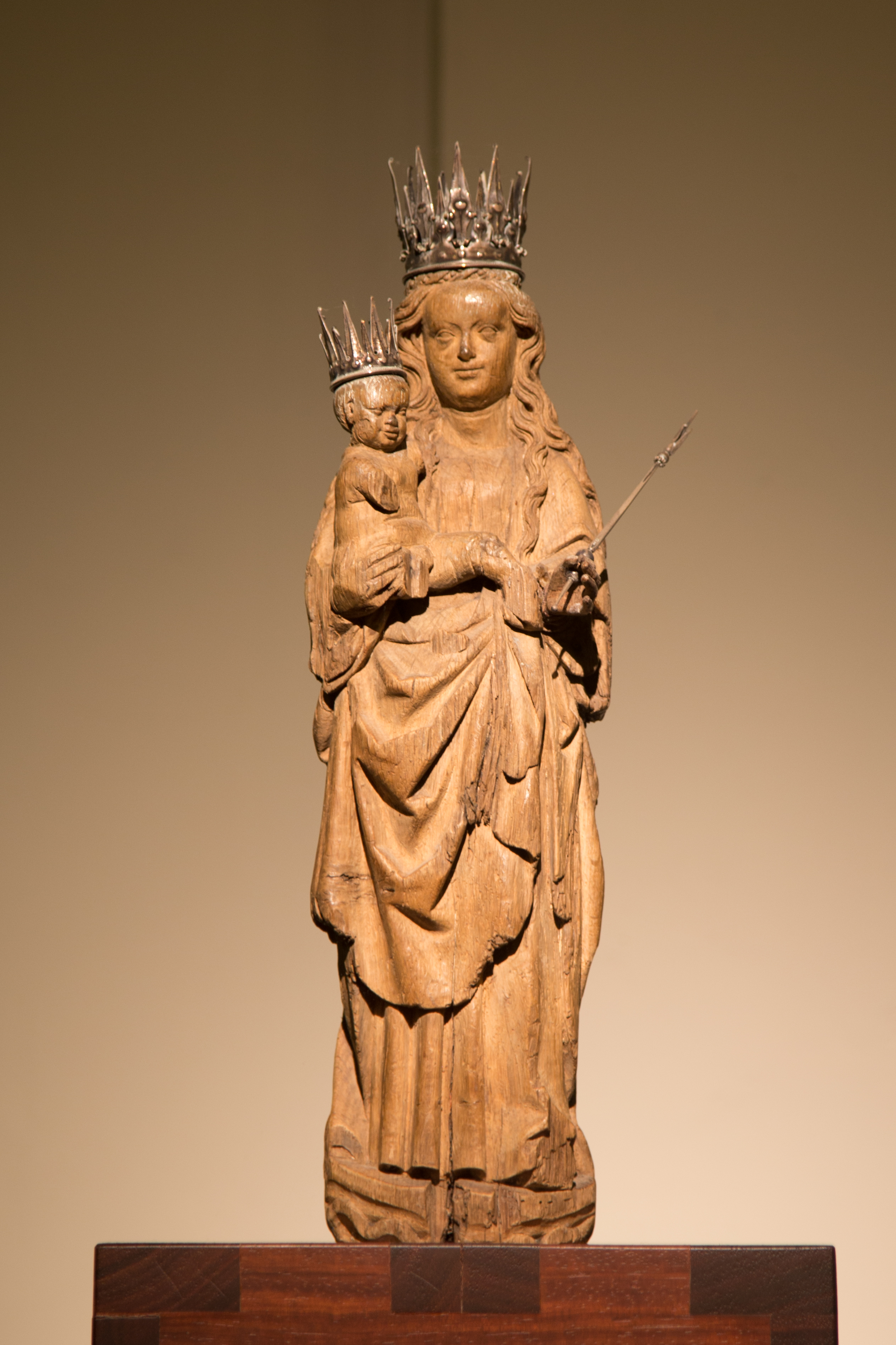 Onze Lieve Vrouw van Amersfoort